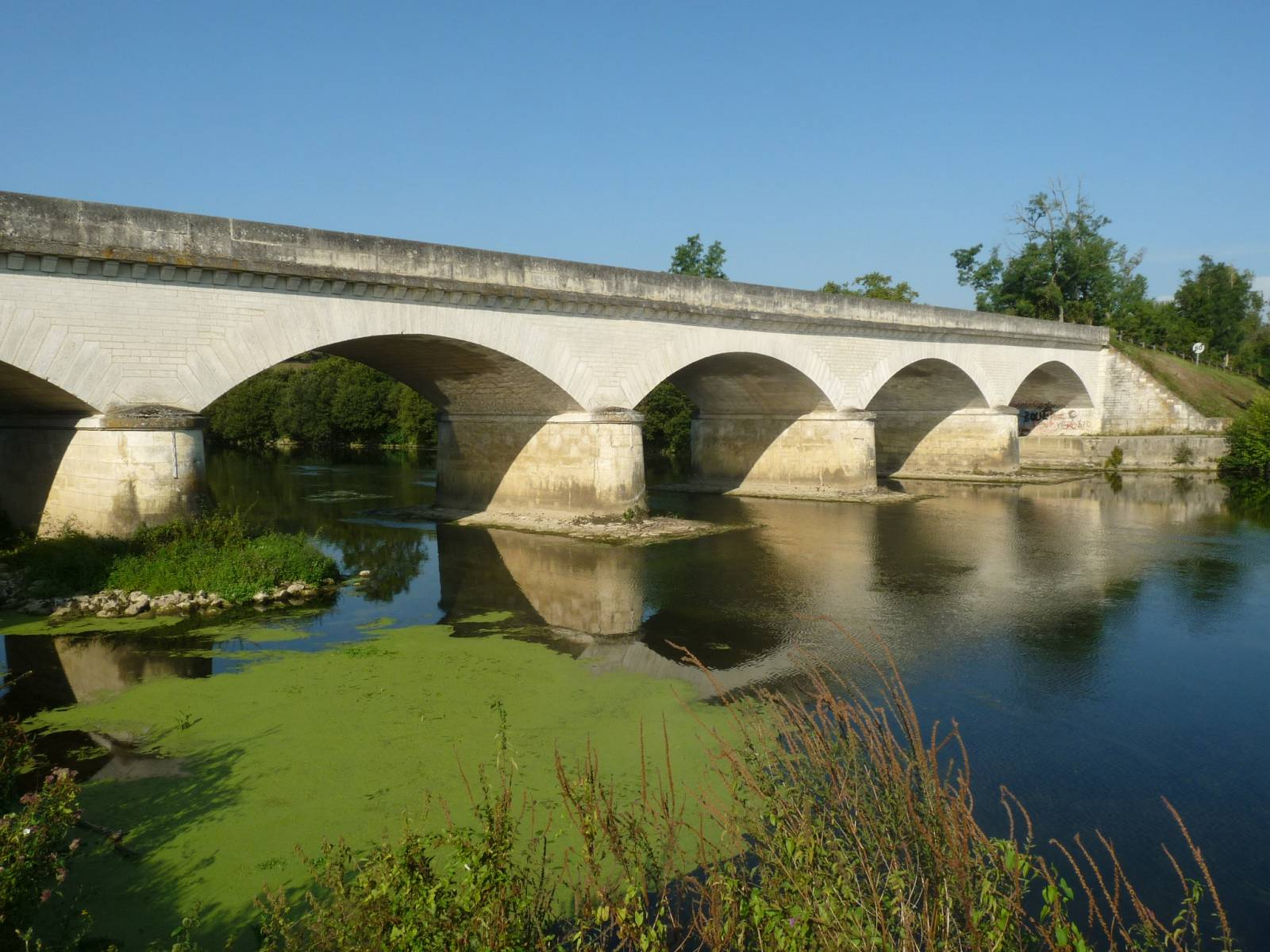 le Pont de la Meure, Nersac (16), France